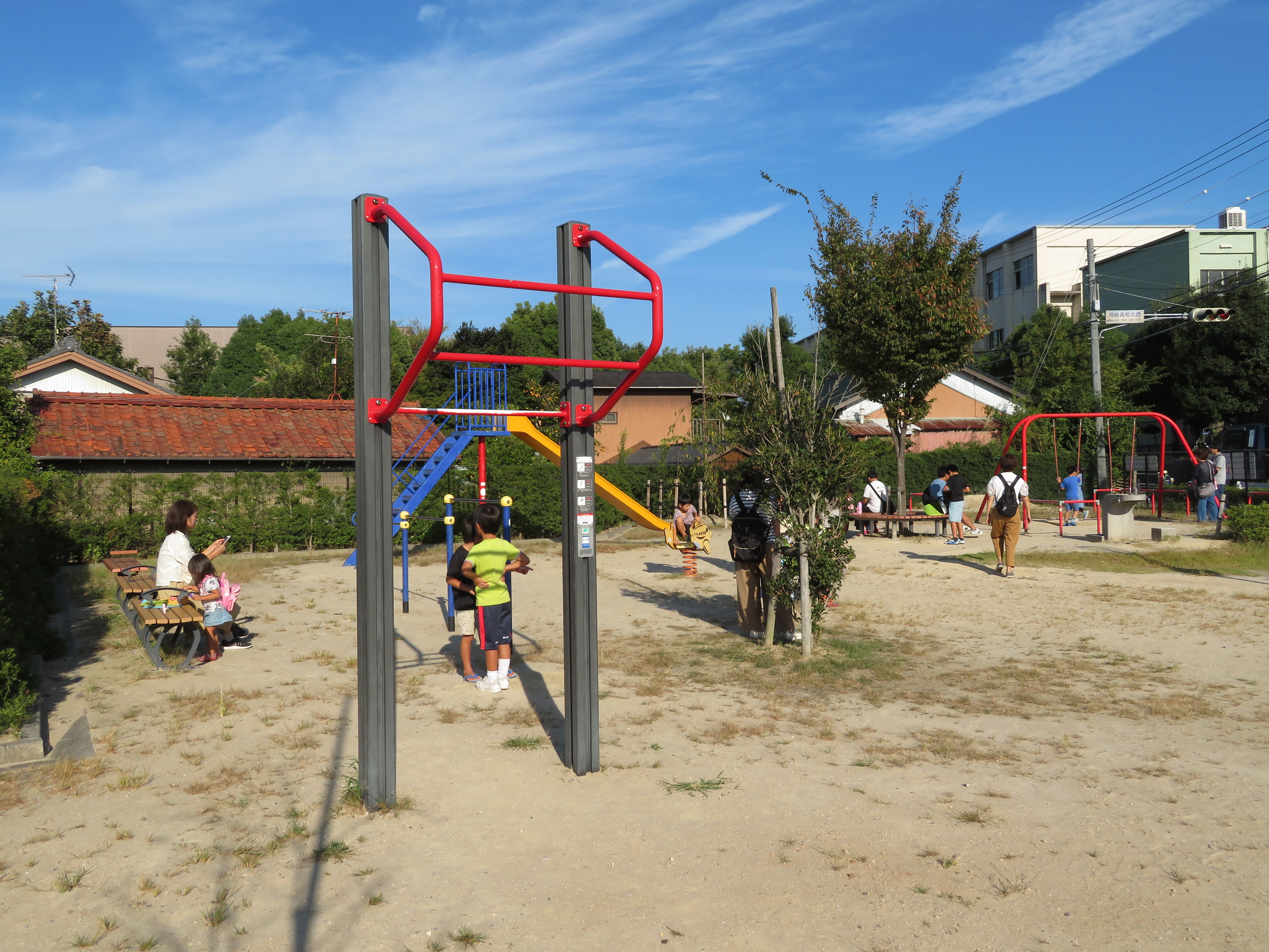 六所の森公園（岡崎市明大寺町）